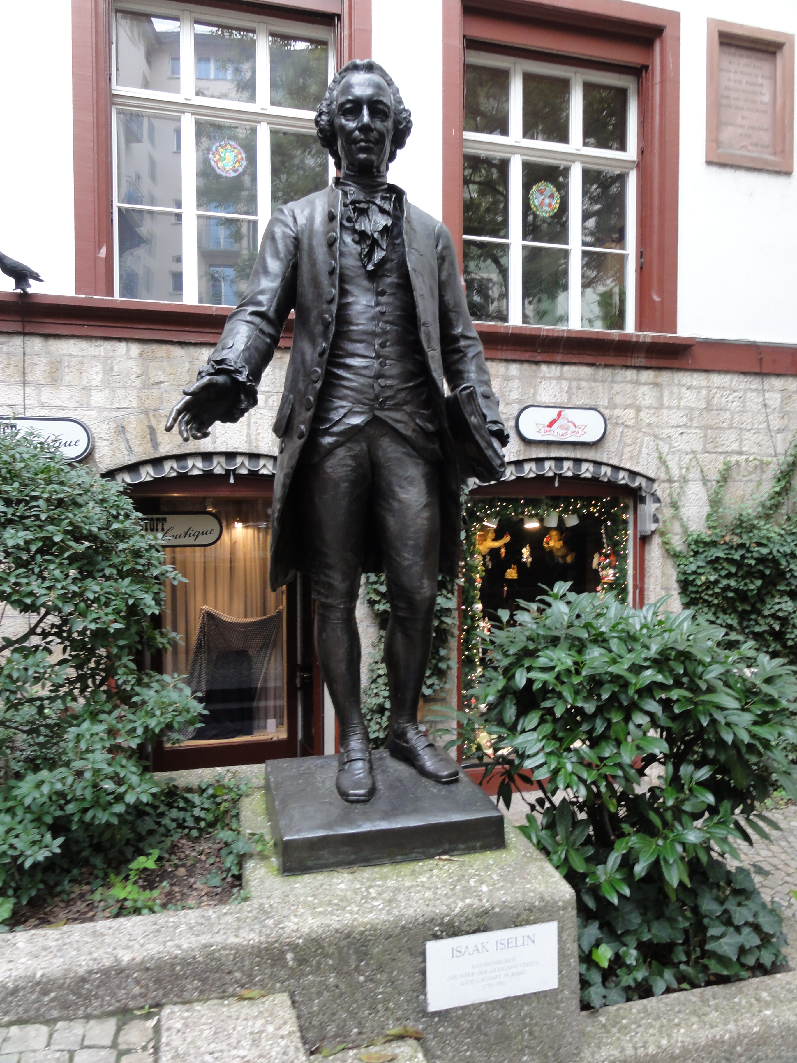 Basel — Rümelinsplatz 19 (sog. Schmiedenhof) — Statue des Isaak Iselin